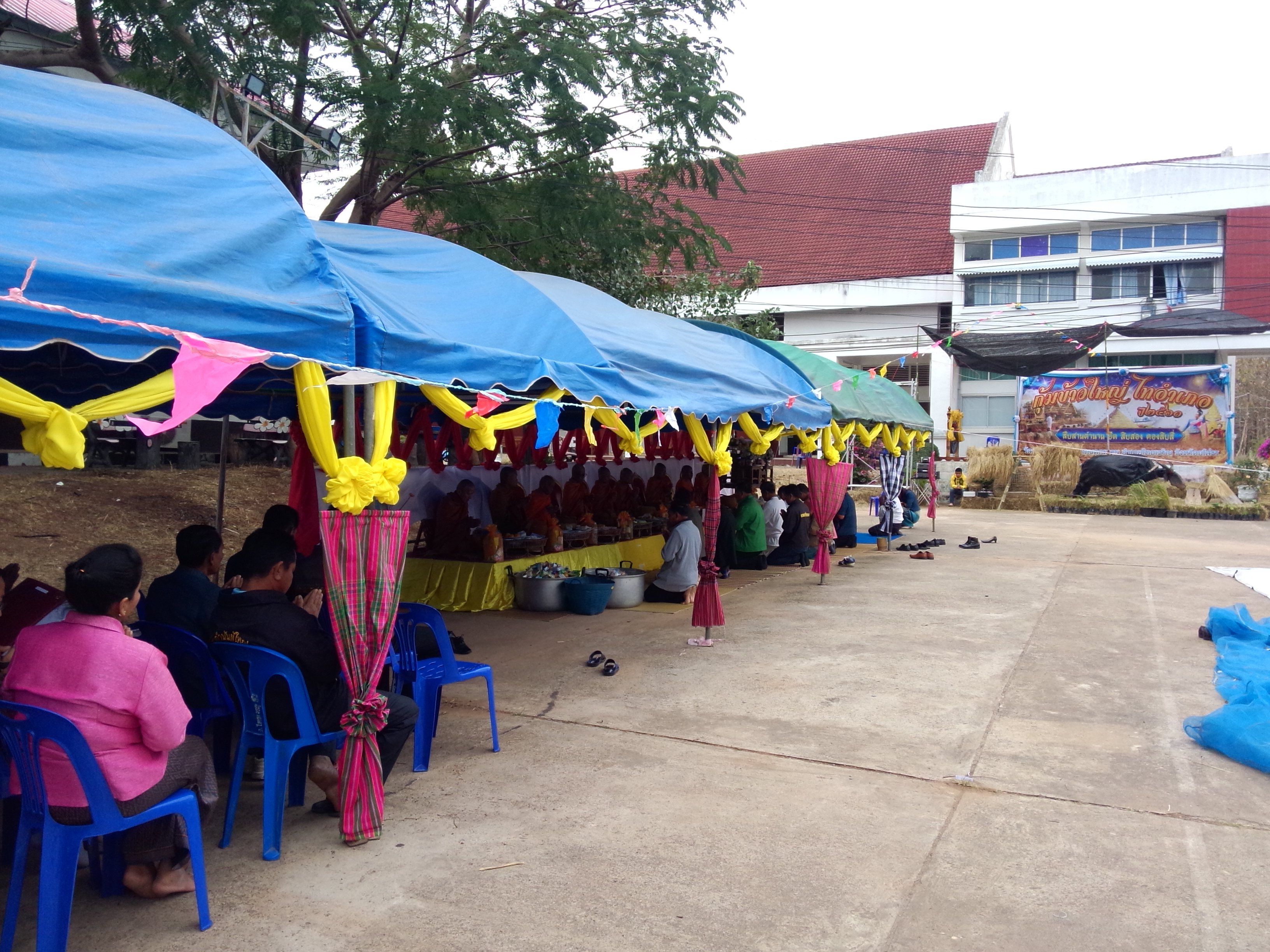 ประเพณีบุญคุณลานอำเภอไทยเจริญ 2561